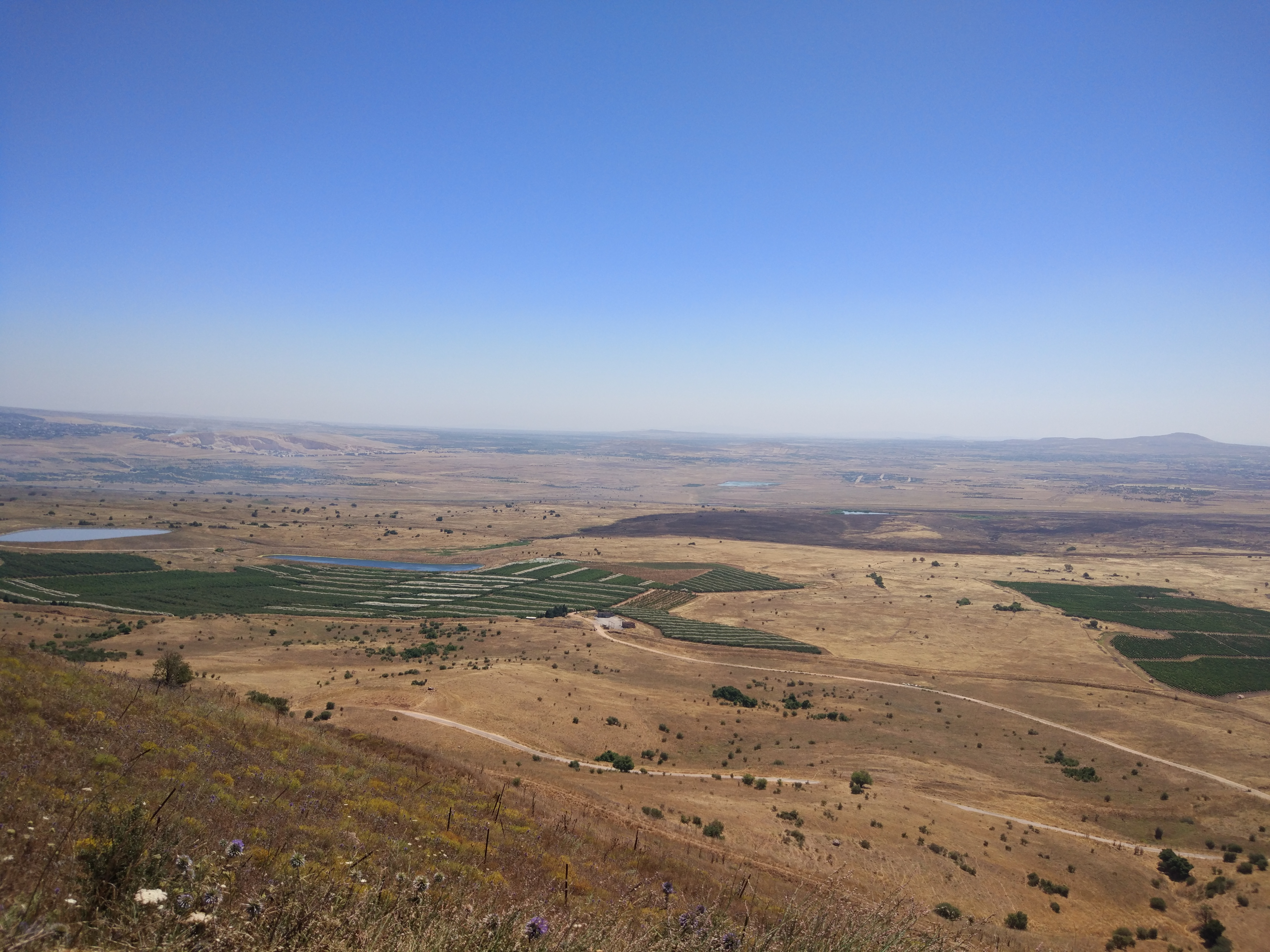 גזרת הפריצה במובלעת הסורית במלחמת יום הכיפורים בצילום מהר חרמונית. משמאל, מעל המחצבות, הכפר ג'ובתא אל חשב, גזרת הפריצה של חטיבה 188 ב-11 באוקטובר. בקצה הימני של התמונה תל שער ומתחתיו חאן ארנבה, גזרת הפריצה של אוגדה 210.